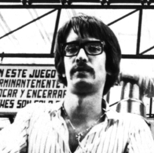 Es una foto de Javier Martínez, baterista, cantante y compositor, líder del grupo Manal.